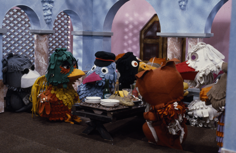 Momfer de Mol, Isadora Paradijsvogel, Gerrit de Postduif, Meneer de Raaf, Lowieke de Vos, Juffrouw Ooievaar & Ed Bever uit de Fabeltjeskrant